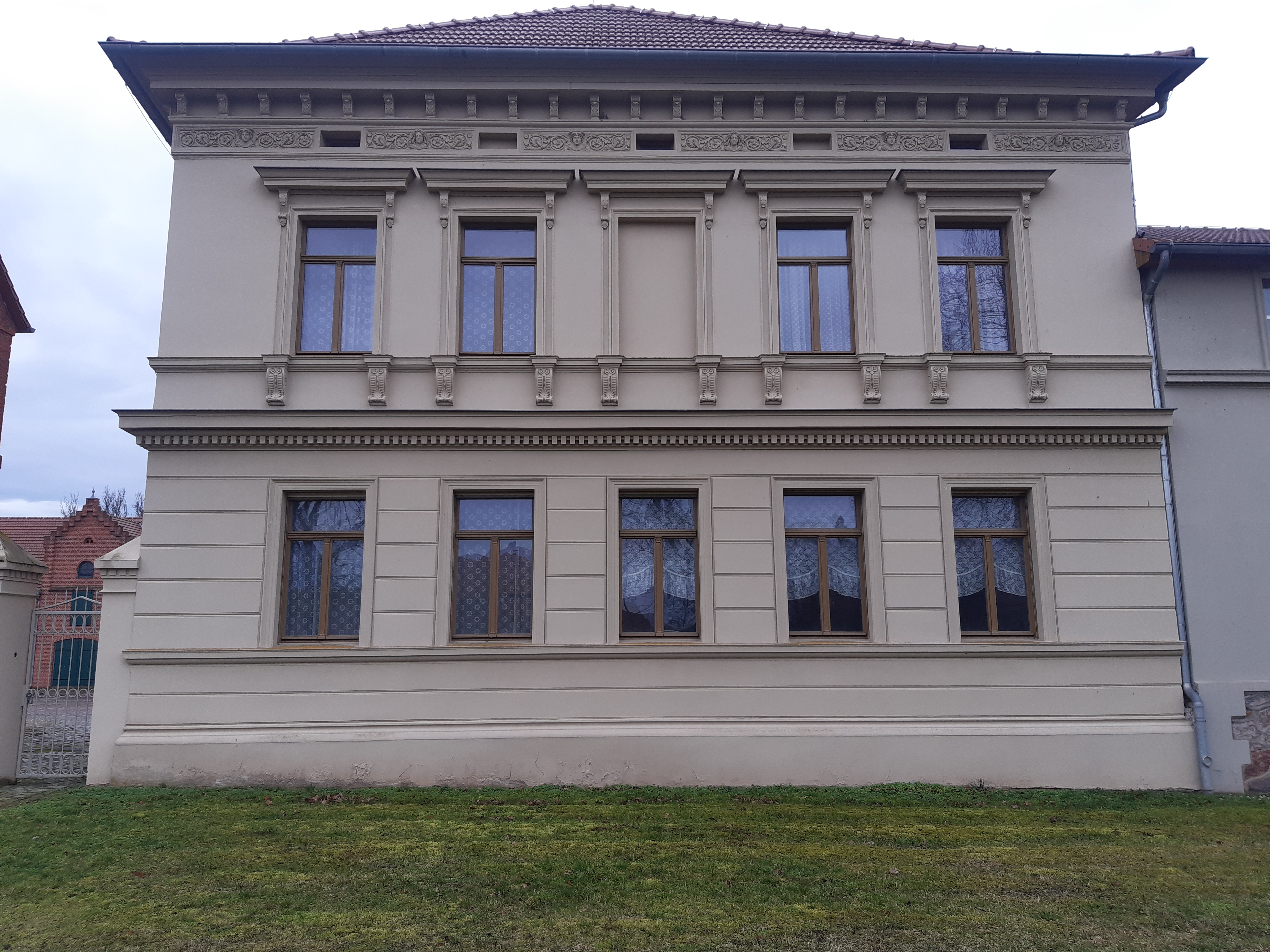 Wohnhaus